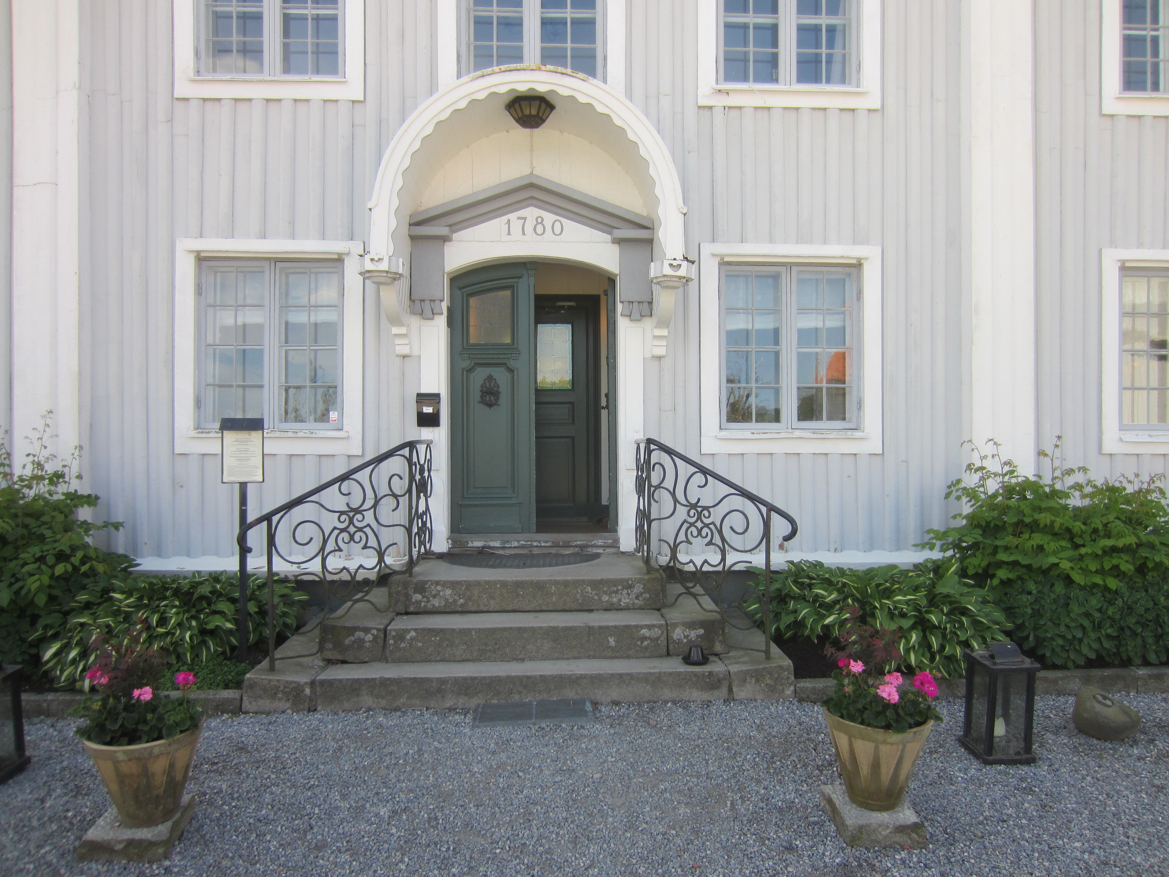 Tofta herrgård, entré